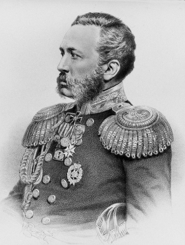 Лит. А. Мюнстера, СПБ. Imp. Lith. A. Munster (Editeur)